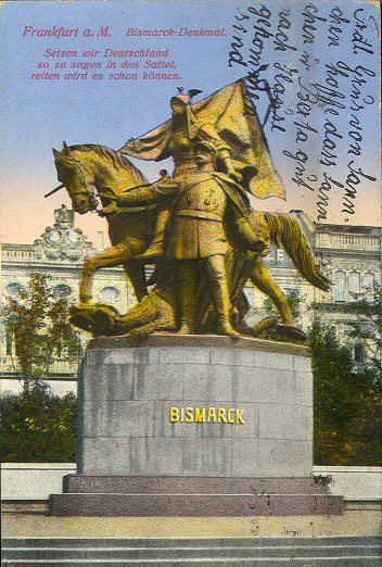 Das Reichskanzler Otto von Bismarck- und Germania-Denkmal zu Frankfurt am Main